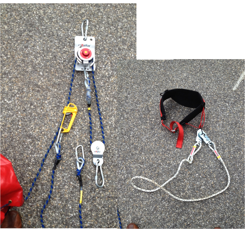 Gerätesatz Auf- und Abseilgerät nach der DIN EN 14800-16 (Rollgliss R 300)